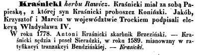 Kasper Niesiecki, Herbarz Polski, wyd. J.N. Bobrowicz, Lipsk 1839-1845 (Kraśnicki herbu Rawicz (t. 5 s. 372))